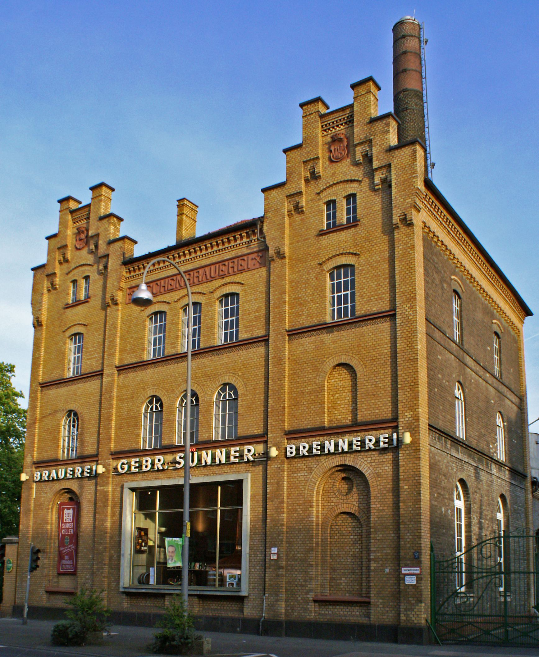 Denkmalgeschütztes Hauptgebäüde der Sünnerbrauerei in Köln-Kalk